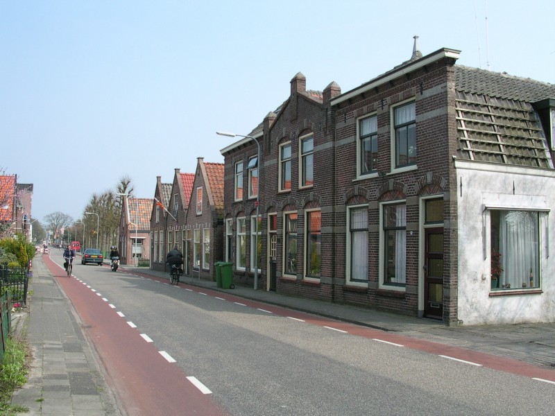 De buurtschap Westeinde in Enkuizen. The hamlet of Westeinde in Enkhuizen.